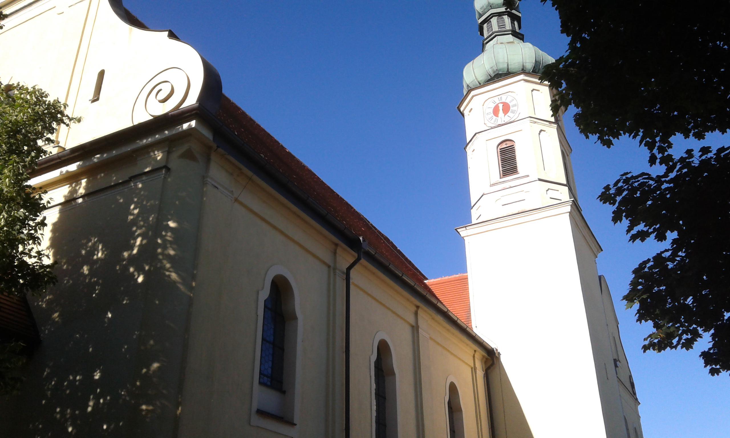 Pfarrkirche St. Johannis der Täufer in Schweitenkirchen